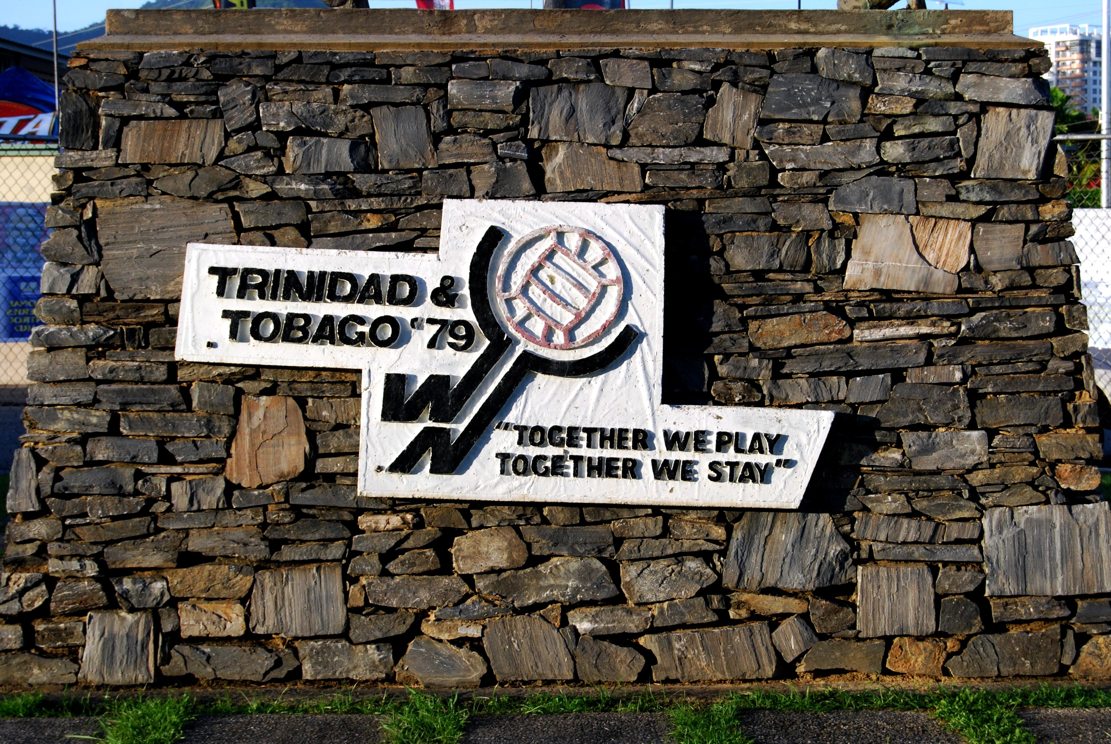 Trinidad & Tobago '79